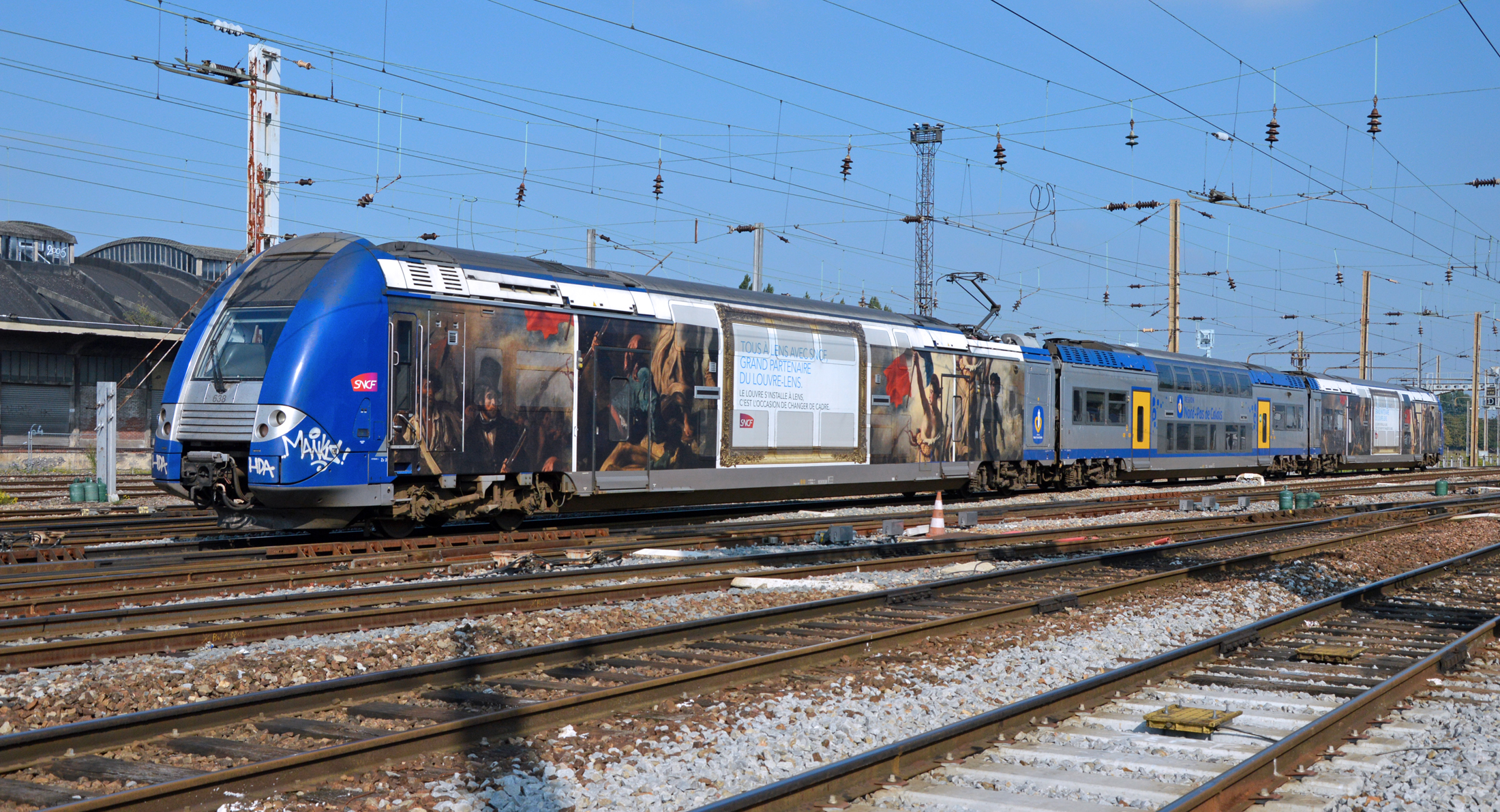 Z 24775/76 (638) avec le pelliculage du Musée Louvre-Lens au départ d'Amiens pour Lille-Flandres